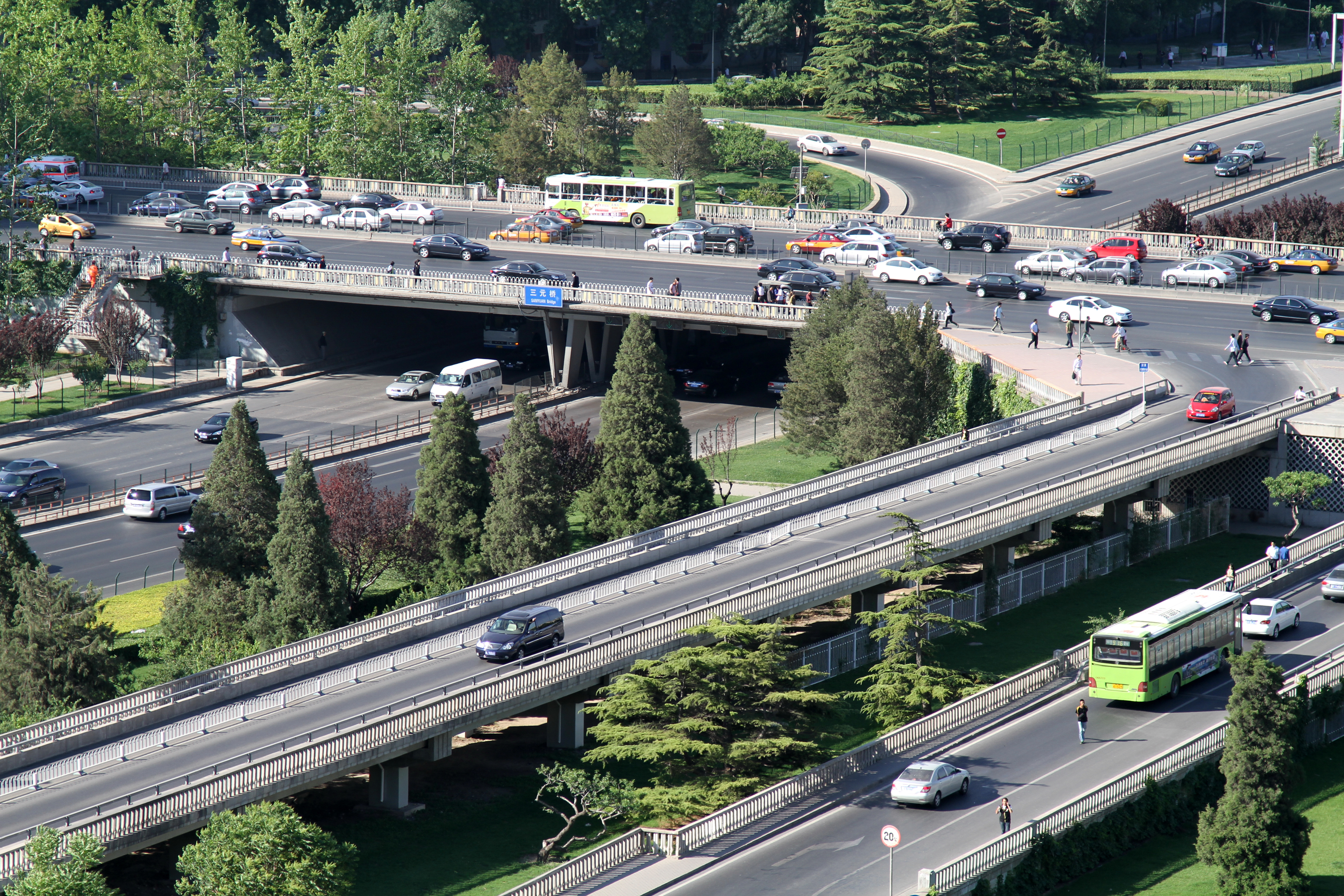 Sanyuanqiao, Beijing